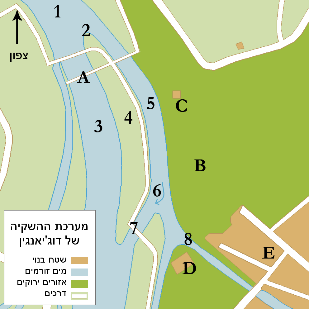 Dujiangyan Irrigation System map